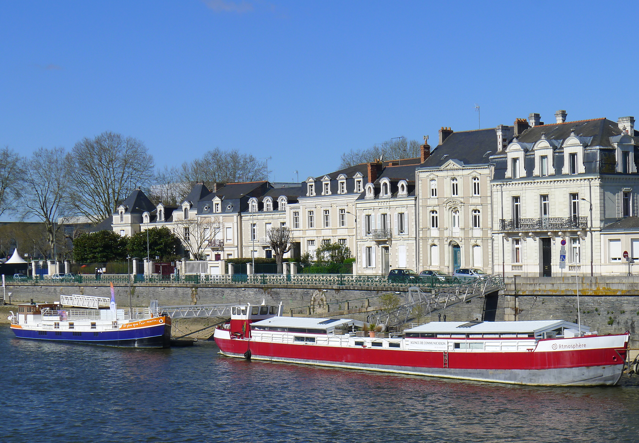 Quai des Carmes dans le quartier de la Doutre - Angers (France)